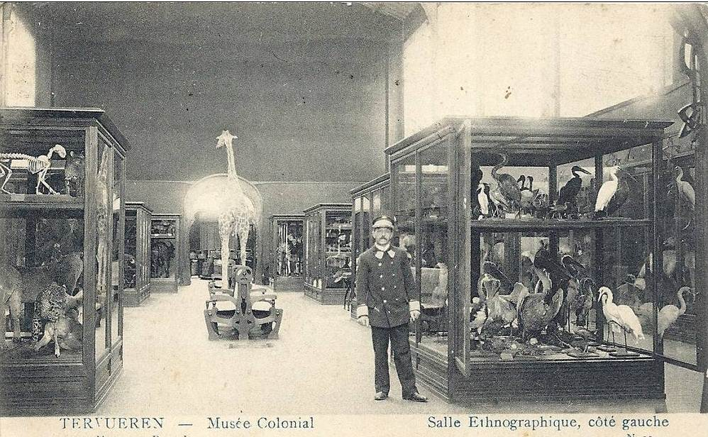 Musée Royal de l'Afrique Centrale (Tervuren) Belgique. Vue ancienne d'une salle du musée (début 20ème siècle). Salle exposant des animaux (présence d'un gardien).